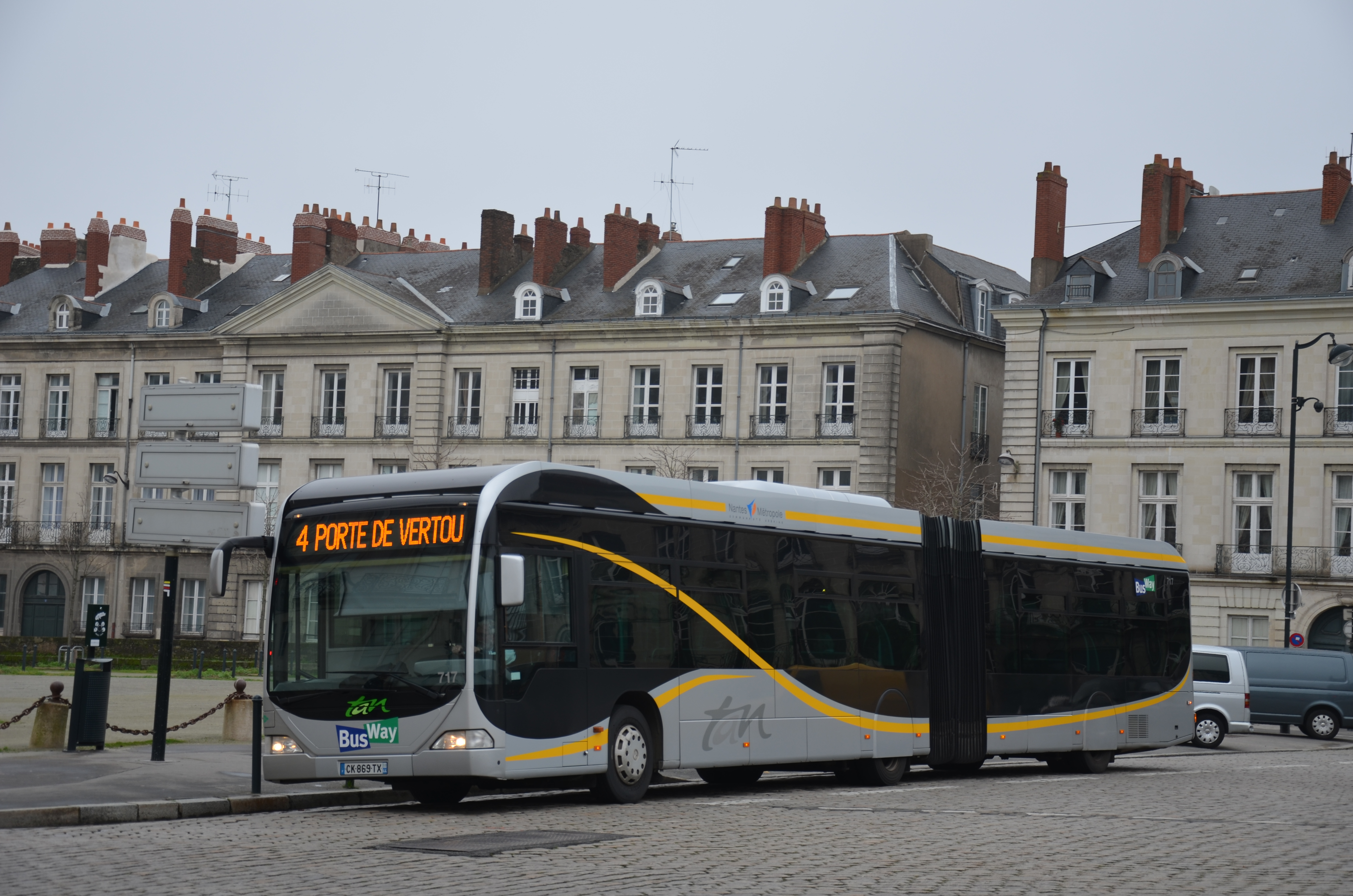 Mercedes Citaro G n°717 à la station Foch Cathédrale, sur la ligne 4 du BusWay de Nantes.